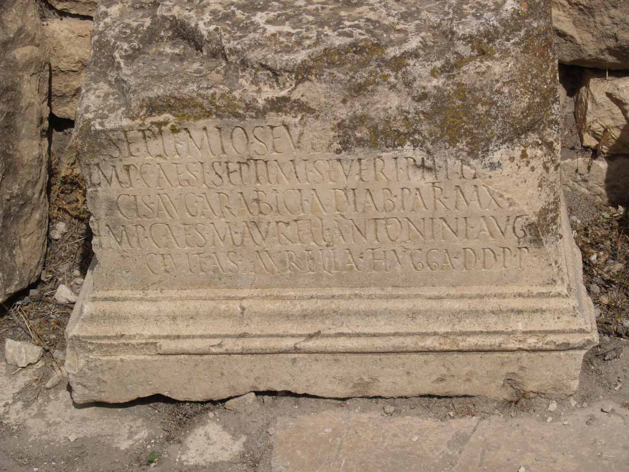 Dougga